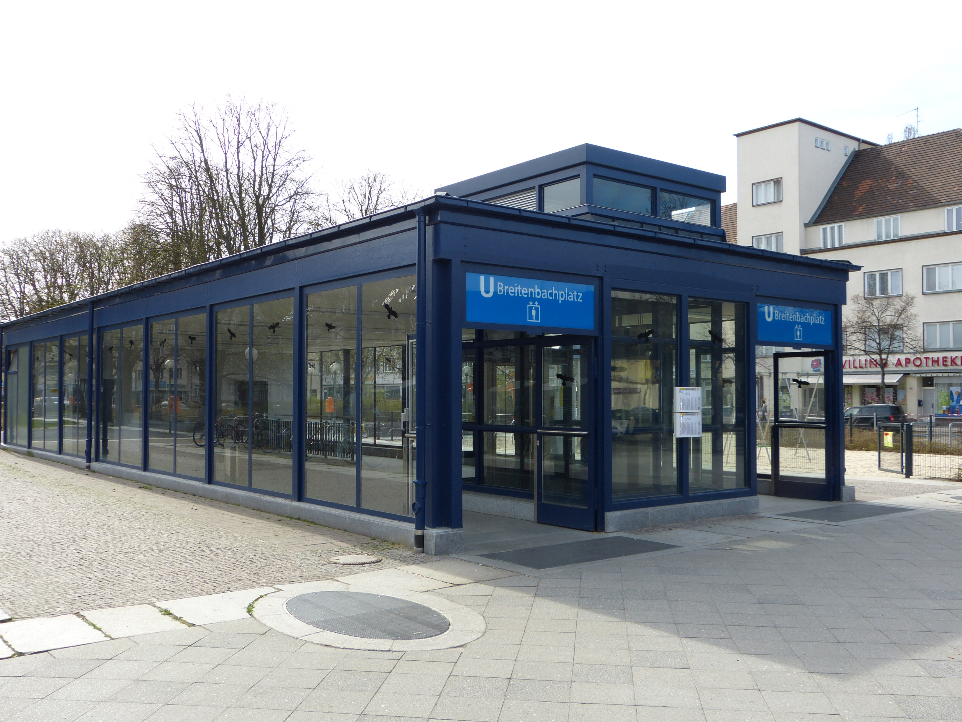 Berlin U-Bahnhof Breitenbachplatz, Mittleres Zugangsbauwerk